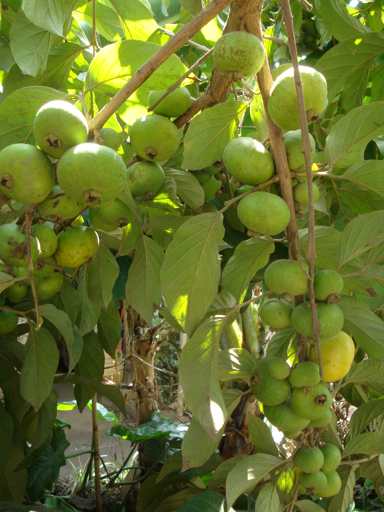 Colaboración con una imagen para Pslillo - Campomanesia lineatifolia